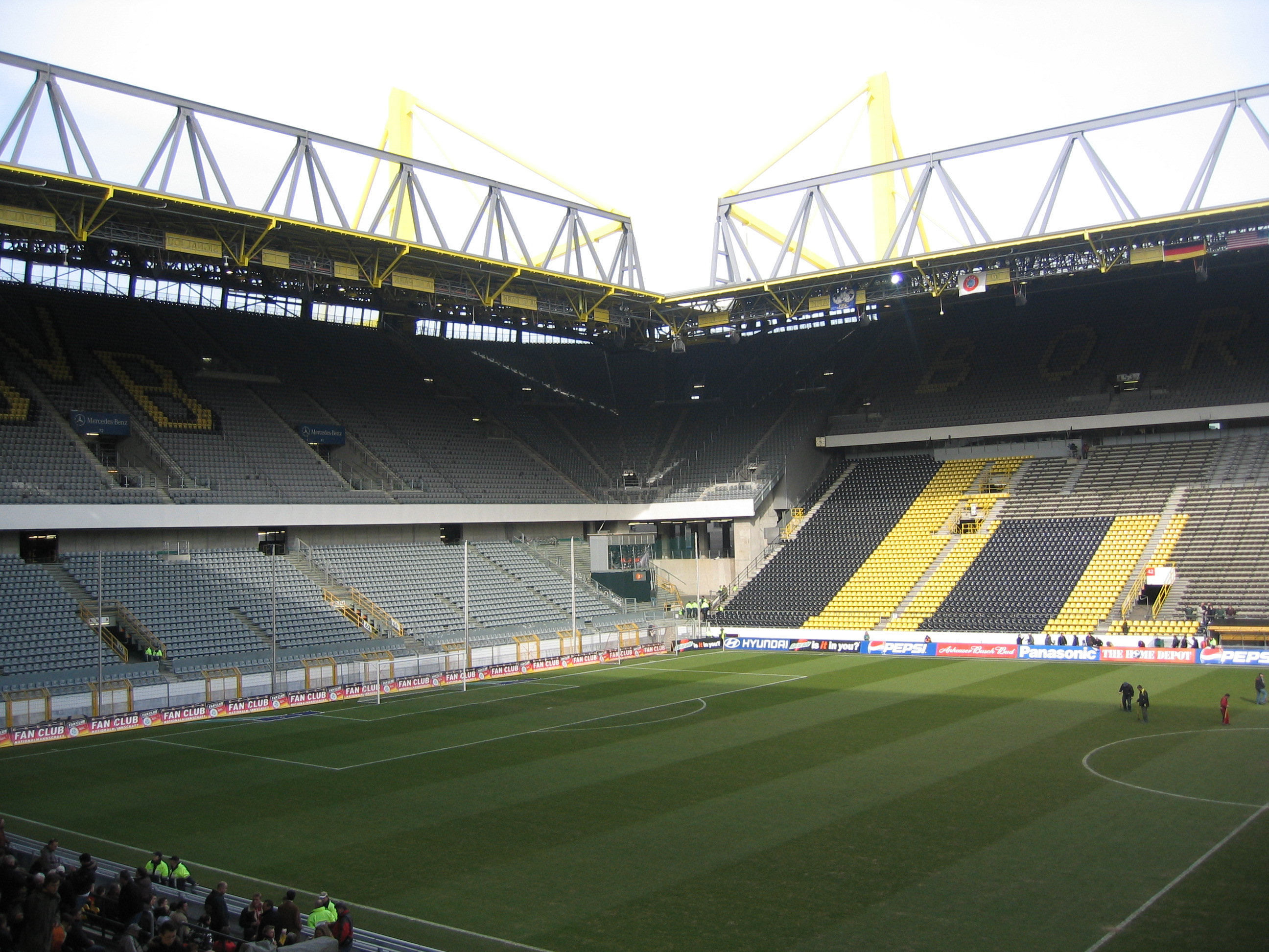 Bildbeschreibung: Westfalenstadion Nord- und Osttribüne Fotograf/Zeichner: Thorsten Bachner Datum: 21.3.2006 Rheien: 100